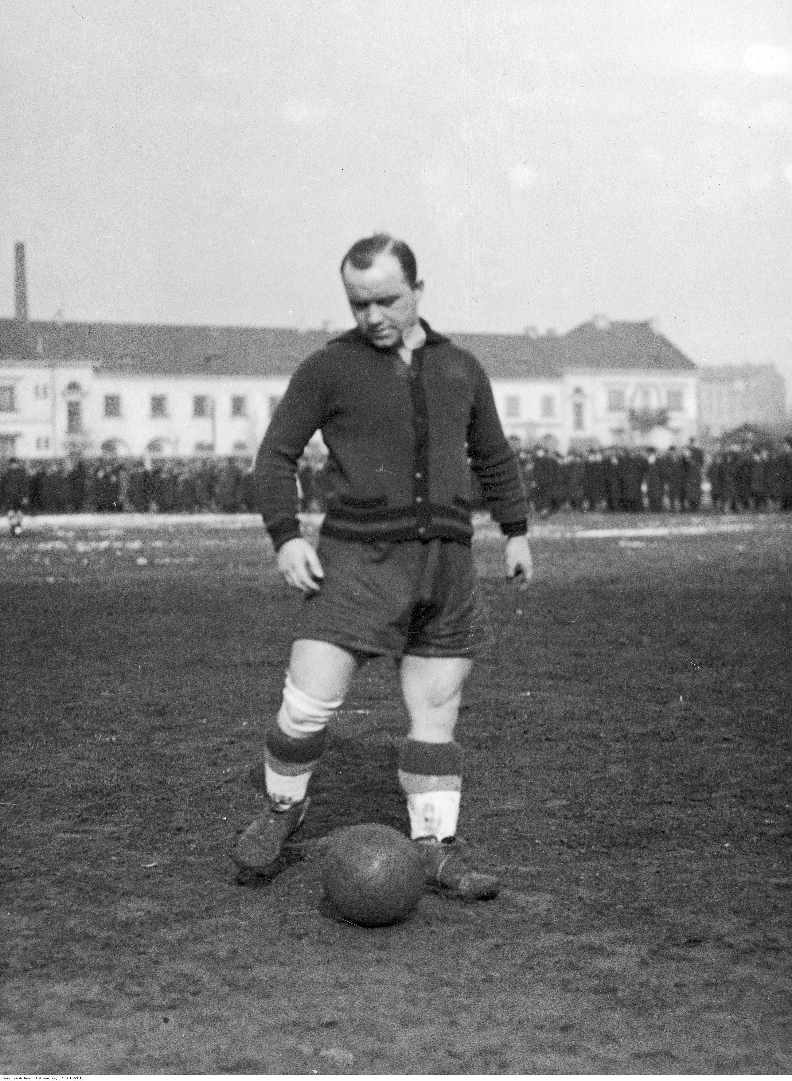 Henryk Martyna, piłkarz WKS Legia Warszawa. Fotografia sytuacyjna (kopie piłkę).